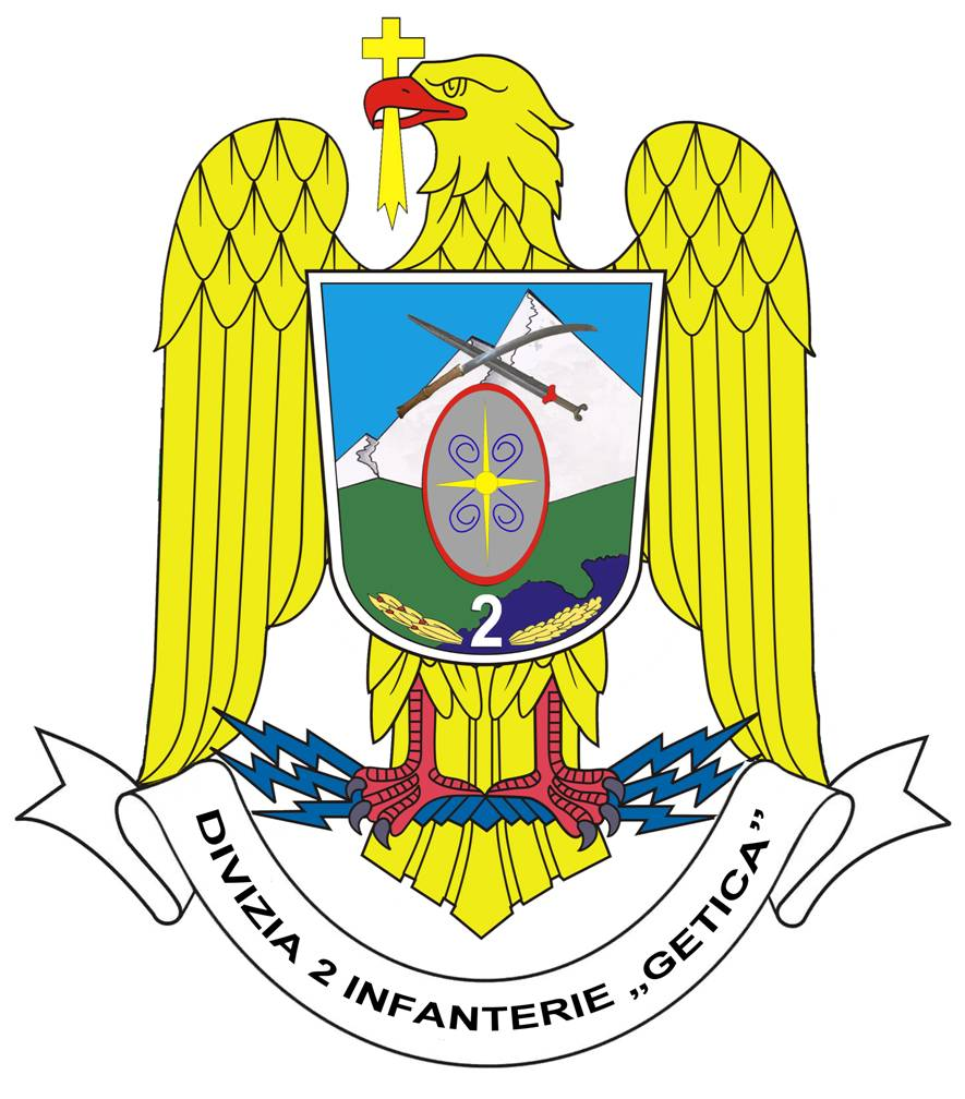 Heraldica